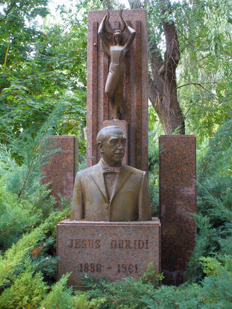 Monumento a Jesús Guridi (Vitoria)